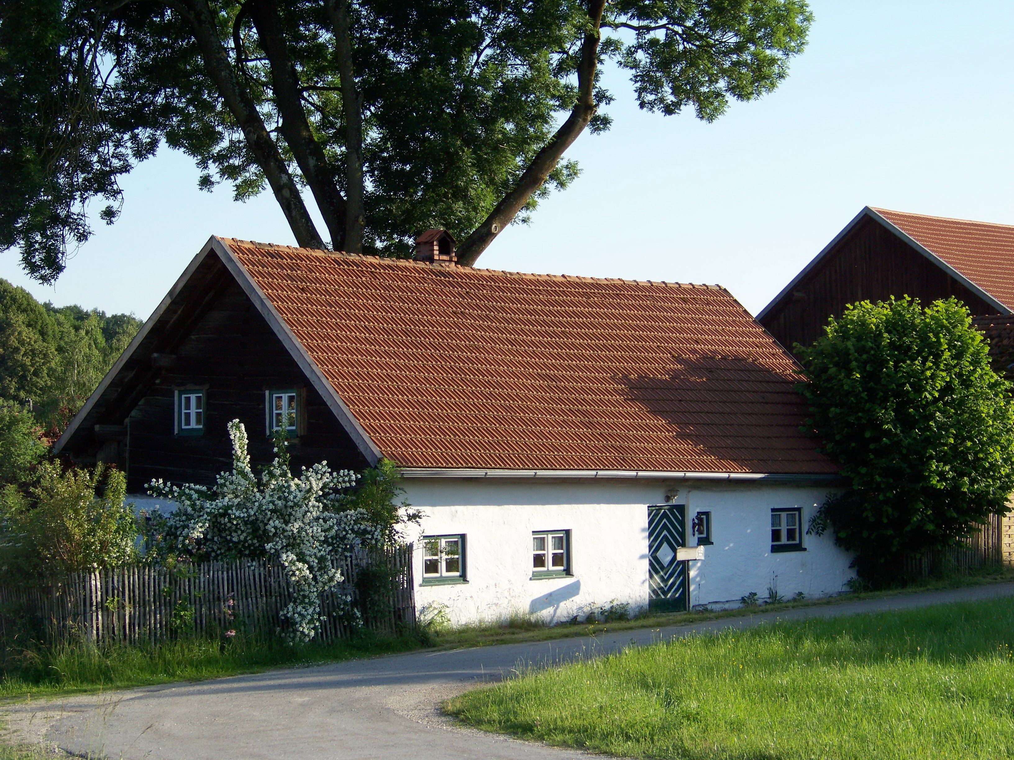 Bayerbach, Feuchten, Kleinhaus, erdgeschossiger verputzter Blockbau mit Steilsatteldach, 18./19. Jahrhundert.